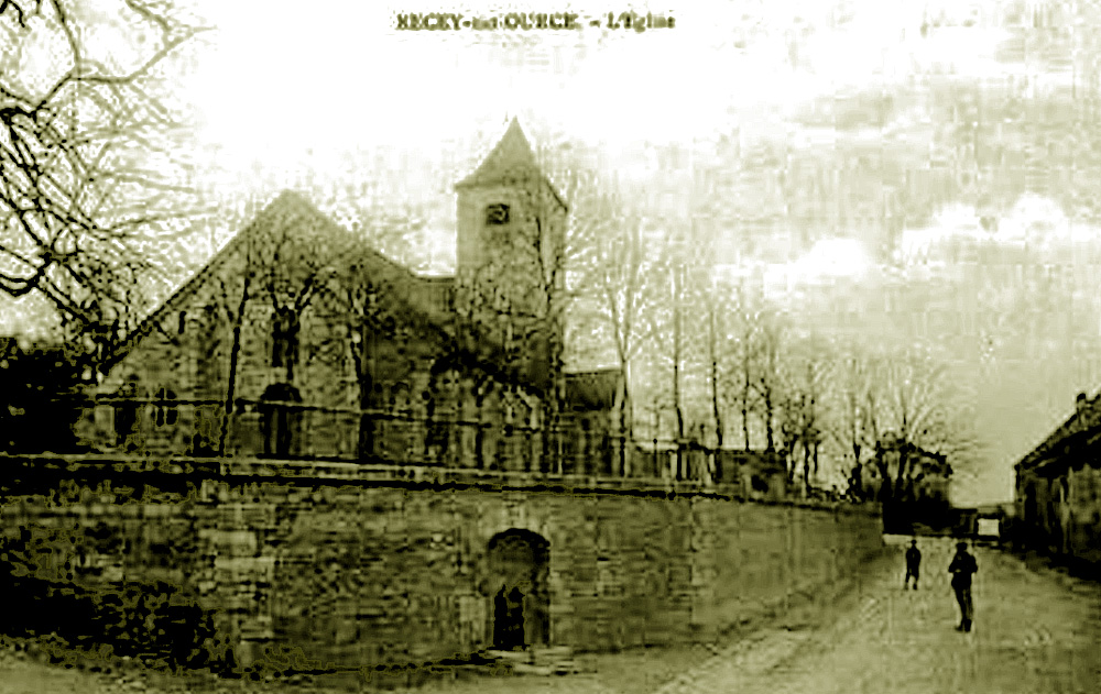 Église Saint-Rémy de Recey-sur-Ource